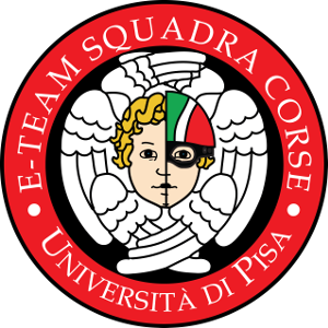 Nuovo Sigillo dell'E-Team